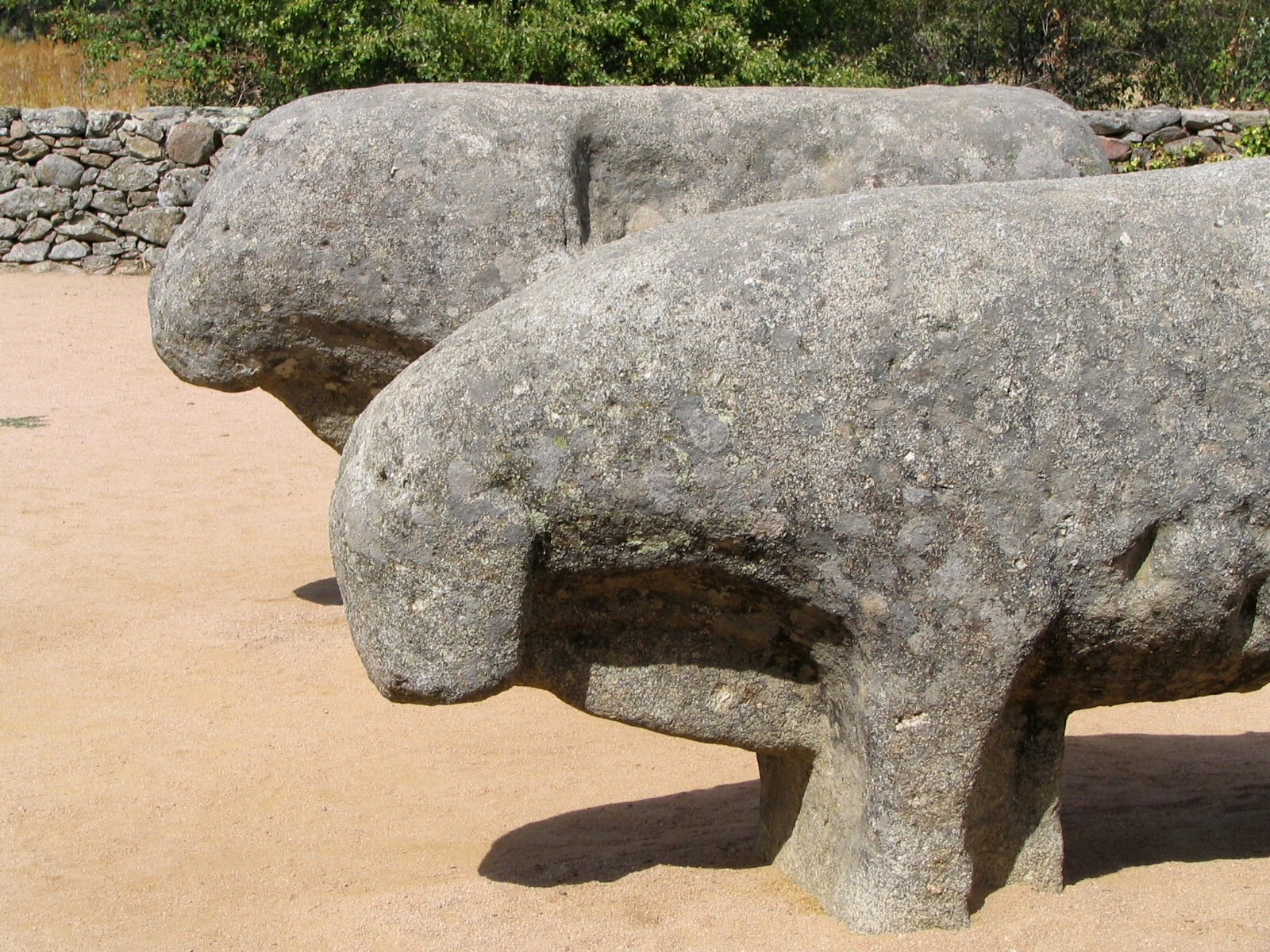 Toros de Guisando TOROS DE GUISANDO thumb|400px|right|TOROS DE GUISANDO